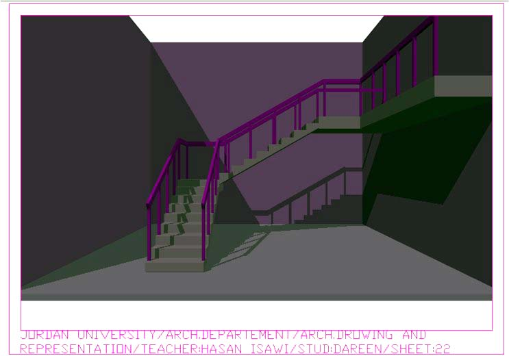 Jordan University / Arch. Department / ARCH. Drawing & Representation / 2012/2013. / Teacher: Arch. Hasan Isawi / Stud.: Dareen Aljammal, Sheet 22 Rappresntazione prospettica centrale di una scala con due rampe ad angolo